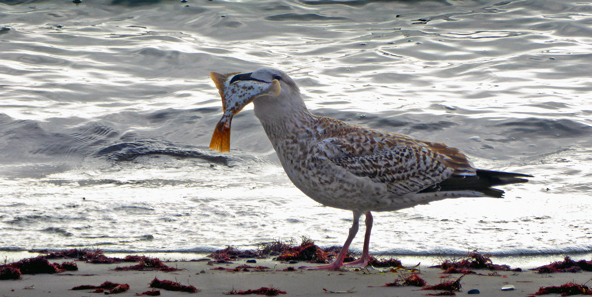 En ung gråtrut sväljer en hel spätta. Ystad 2018.